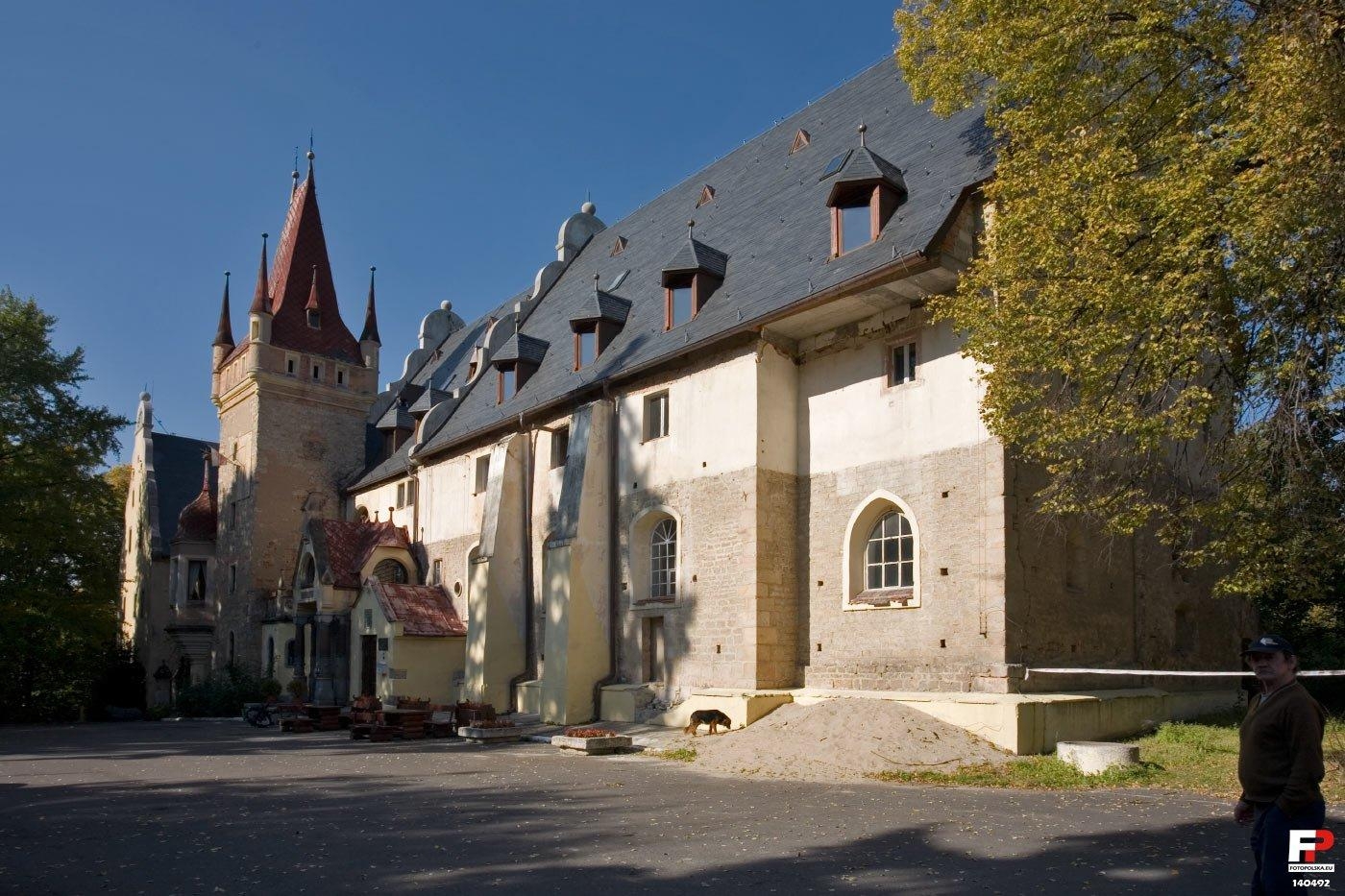 Porównując zdjęcia sprzed pięciu lat wydawać się może na pierwszy rzut oka, że nastąpiły zmiany kosmetyczne. Jednak trwający wciąż remont usunął nie tylko drażniące pierwszomajowe malowanie na biało przypór i cokołu. Znalazłam malutkie zdjęcia w internecie pokazujące montaż więźby dachu, wydaje mi się, że stalowej. Główny dach pokryto łupkiem (a może to udające łupek płytki firmy Eternit?). Wysokie drzewa, które wyrosły w sposób niekontrolowany, przy jesiennym słońcu zacieniają najładniejszą część fasady.